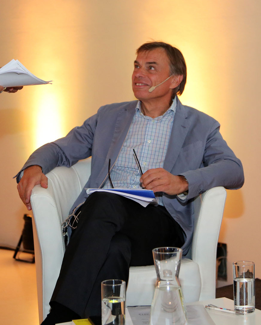 Penninger_Josef,Jelinek_Gerhard,Weitgruber_Barbara-0900